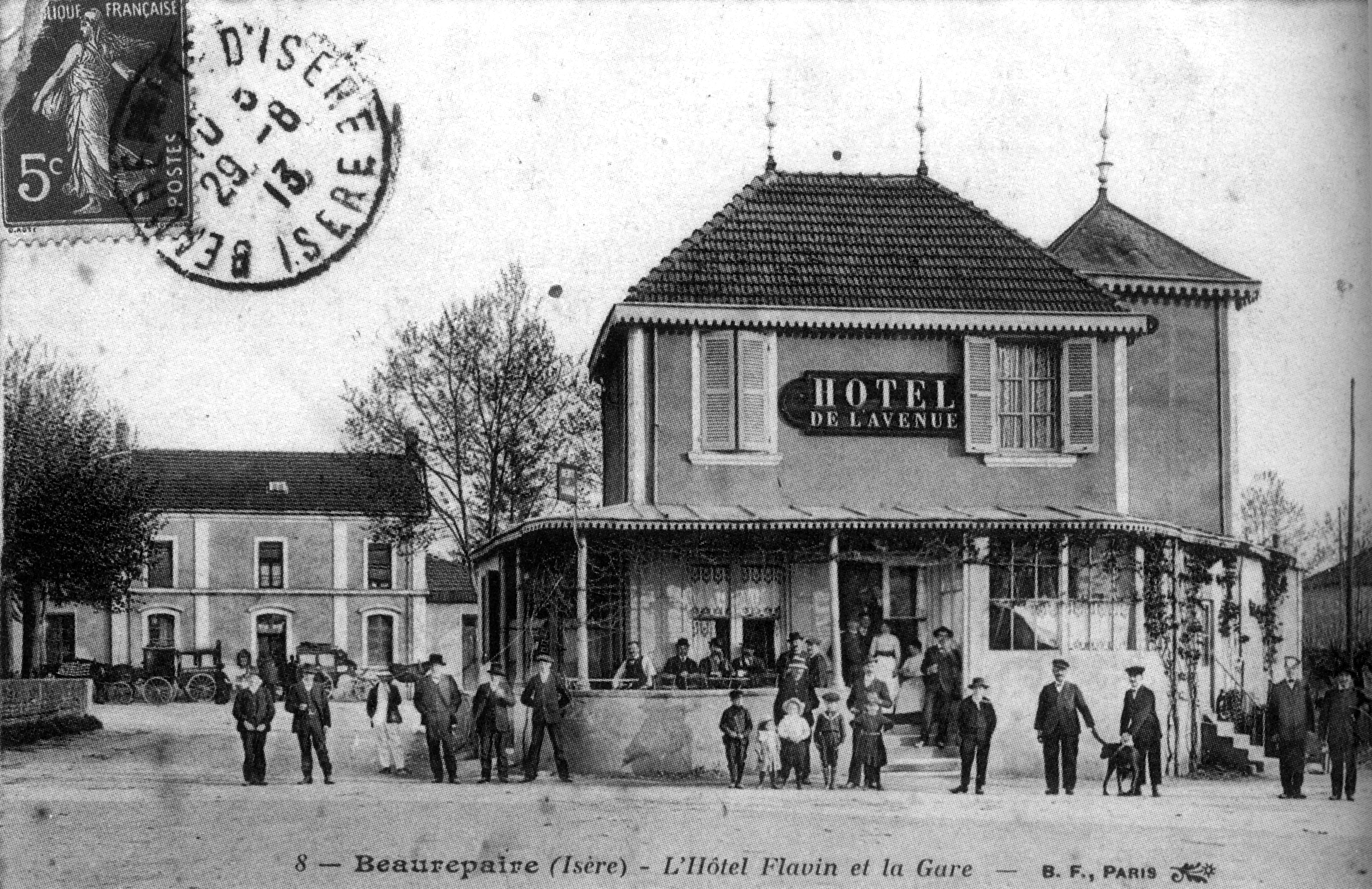 Beaurepaire, l'hotel Flavin et la Gare